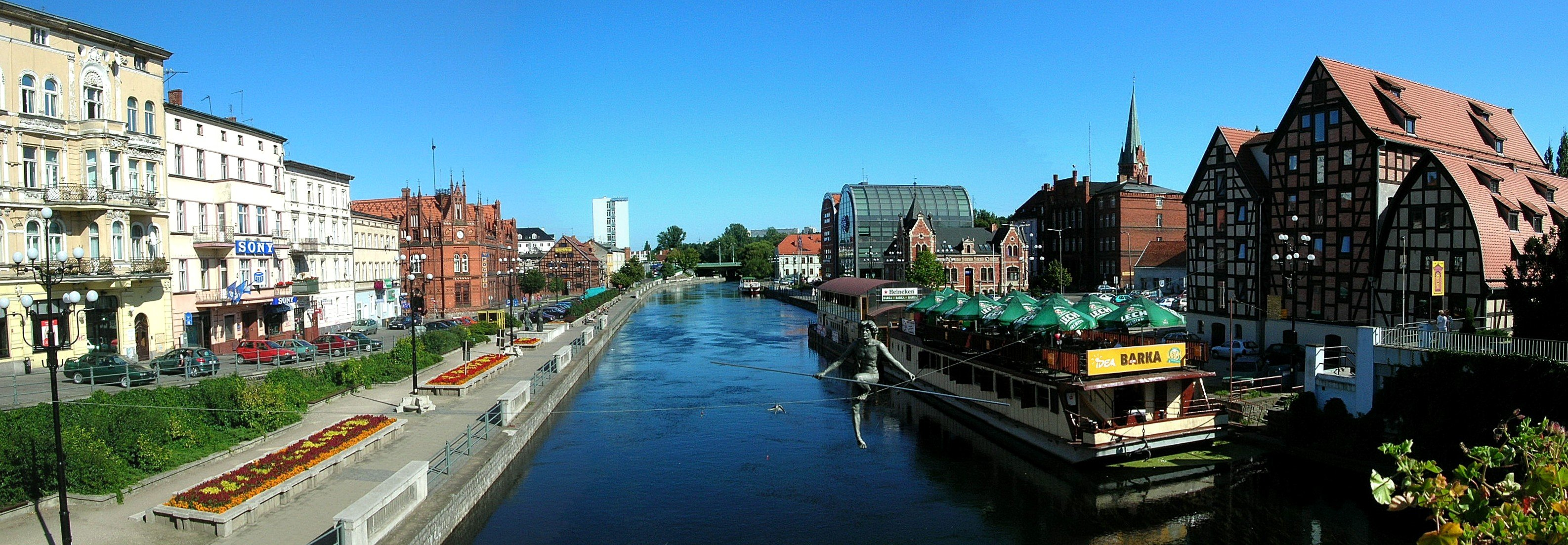 Panorama z mostu Staromiejskiego w Bydgoszczy